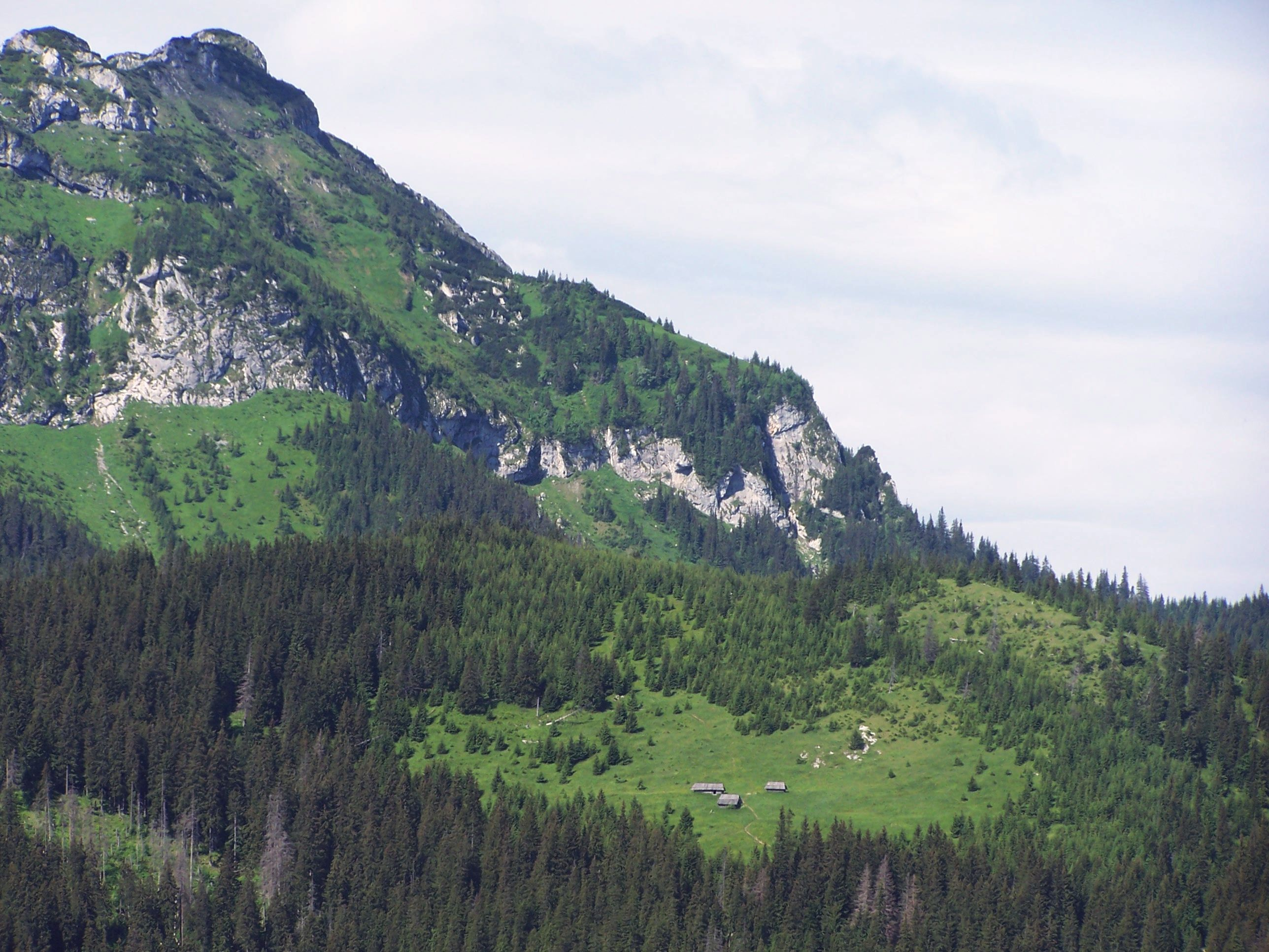 Kominiarski Wierch, Polana Stoły (West Tatra Mountains). View from Polana Upłaz